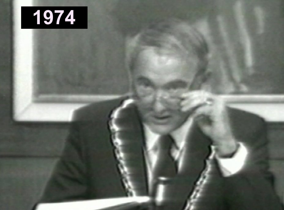 Franciscus Maria (Frans) Feij (Echt, 6 mei 1926 - Roermond, 20 november 2010) was een Nederlands burgemeester en politicus, aanvankelijk voor de KVP en vanaf 1971 voor de VVD.